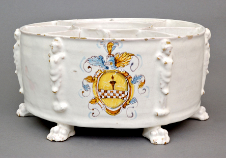 Rafraichissoir